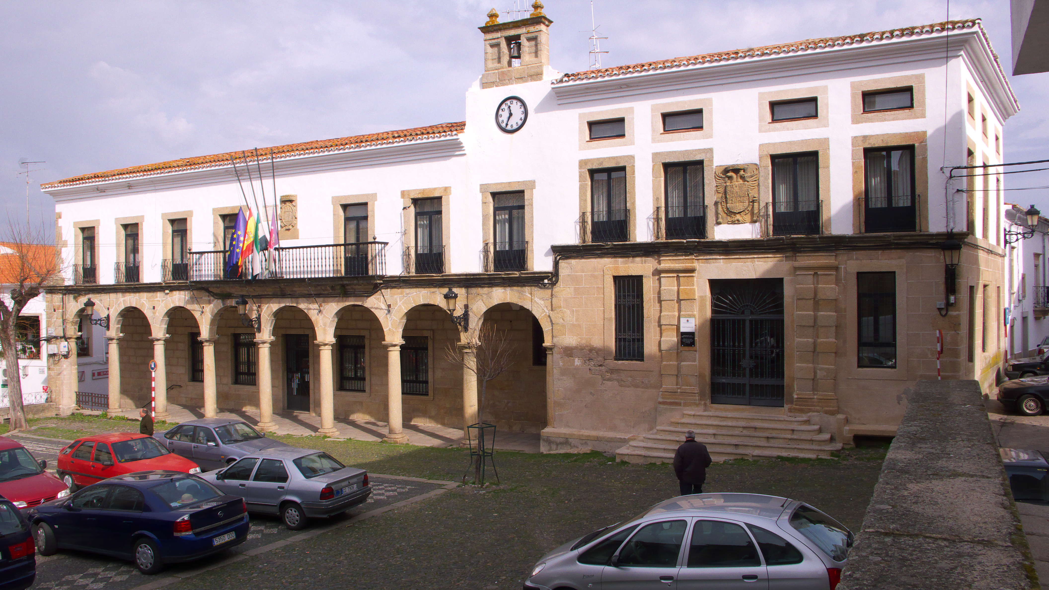 En el año 1691 de reedifican las Casas Consistoriales